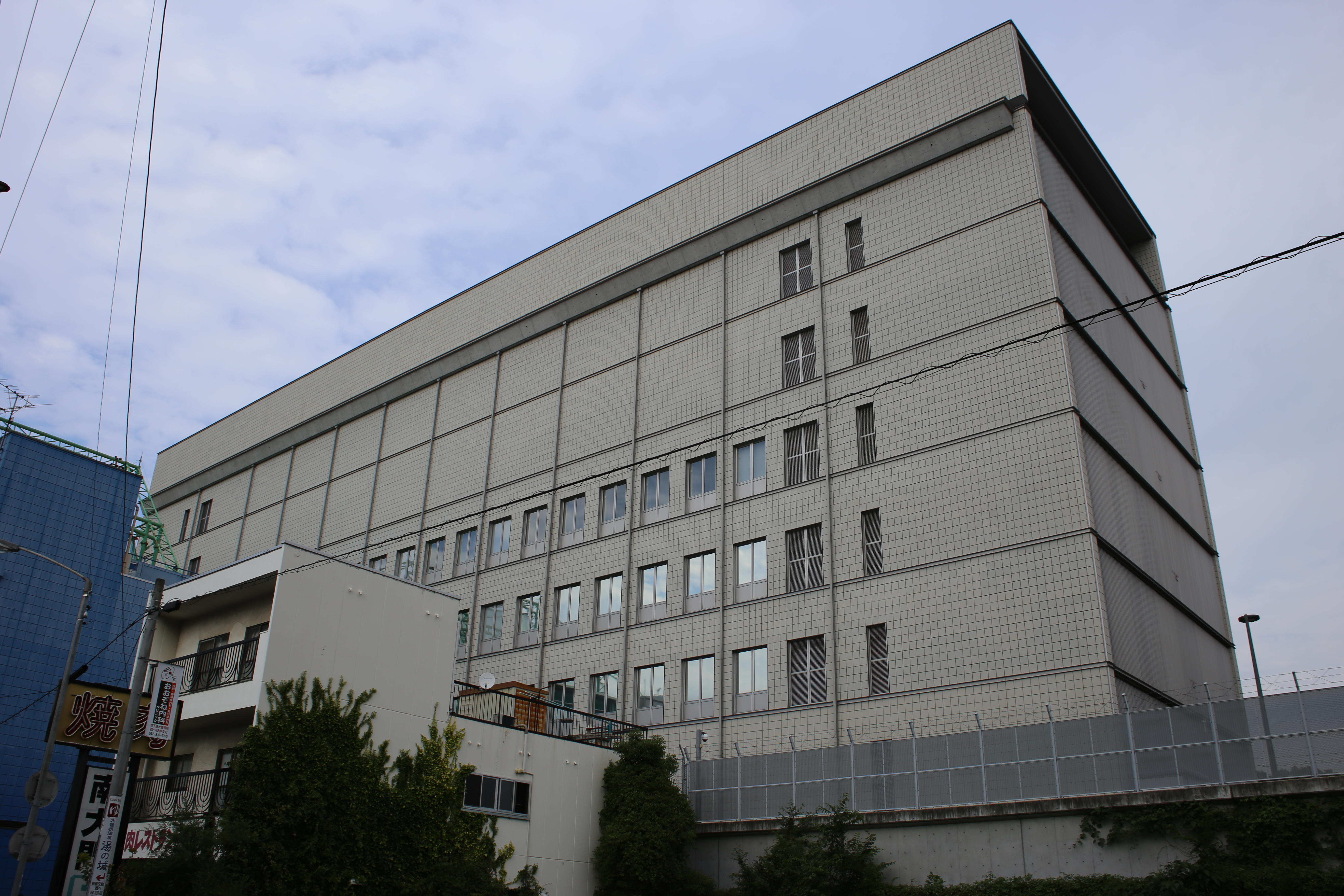 名古屋市東区東大曽根町にあるジェイアール東海情報システム本社を西側公道南側より撮影